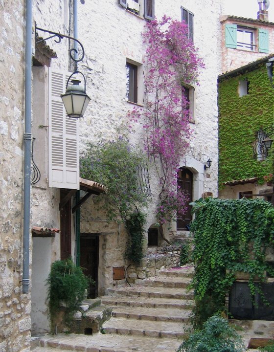 Tourrettes-sur-Loup, Alpes-Maritimes, France